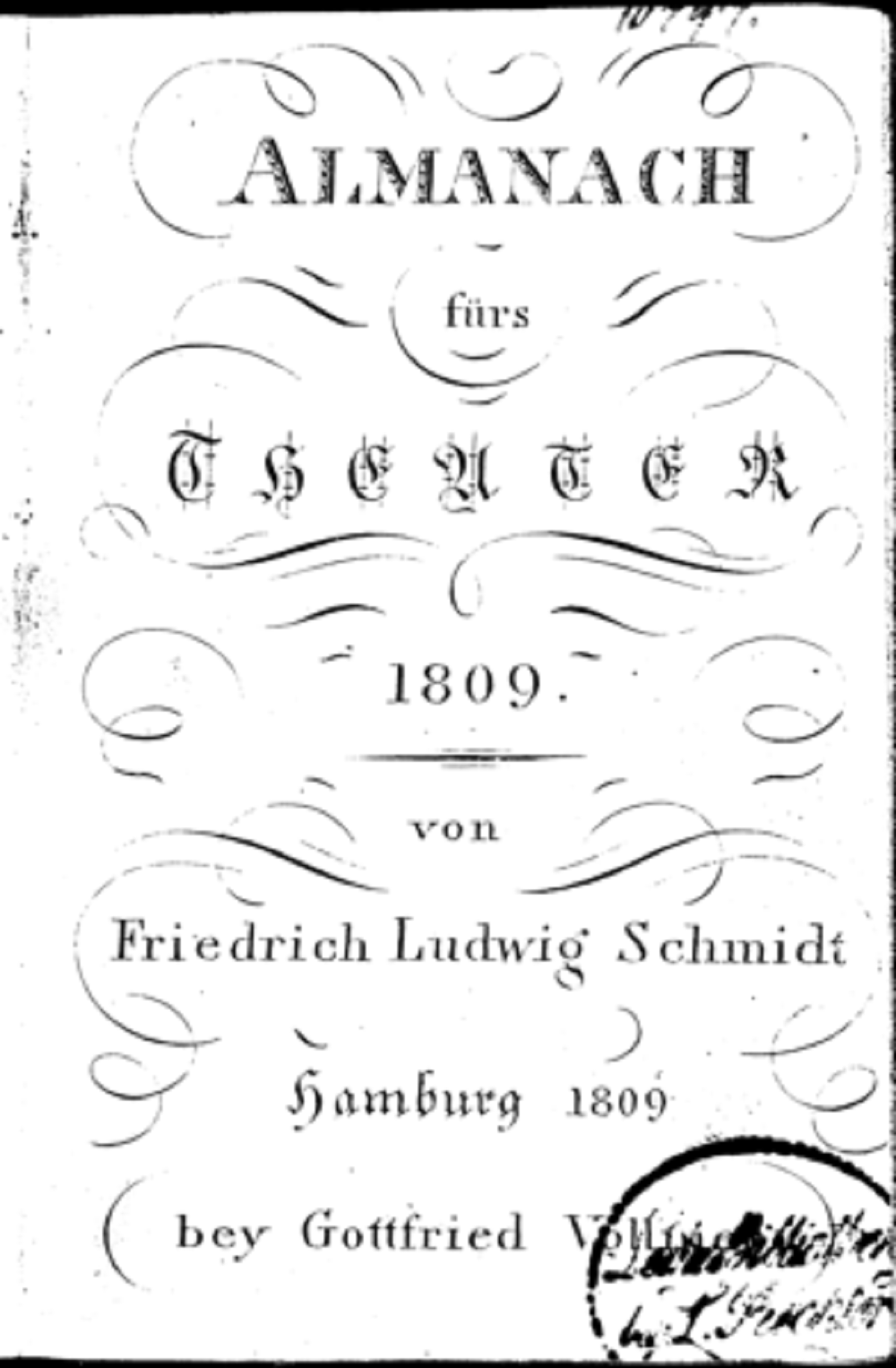 Deckblatt von Almanach fürs Theater von Friedrich Ludwig Schmidt (Schauspieler, 1772)